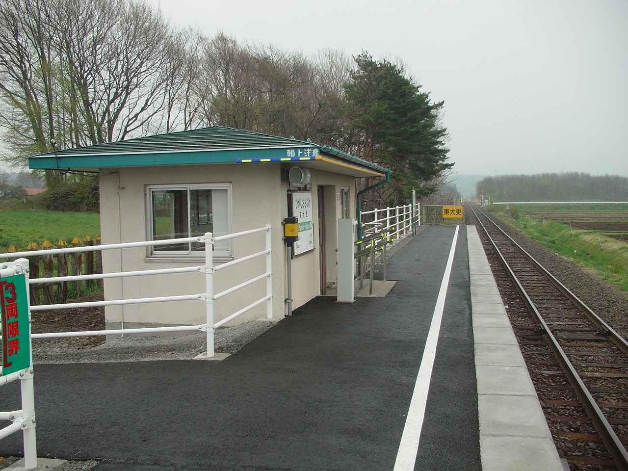 （東大更駅）